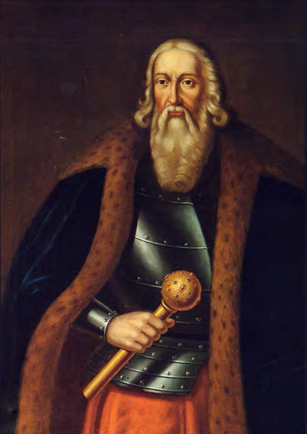 Беларуская (тарашкевіца): Партрэт Мікалая Радзівіла Старога (Mikałaj Radzivił Stary). Копія з больш раньняга твору